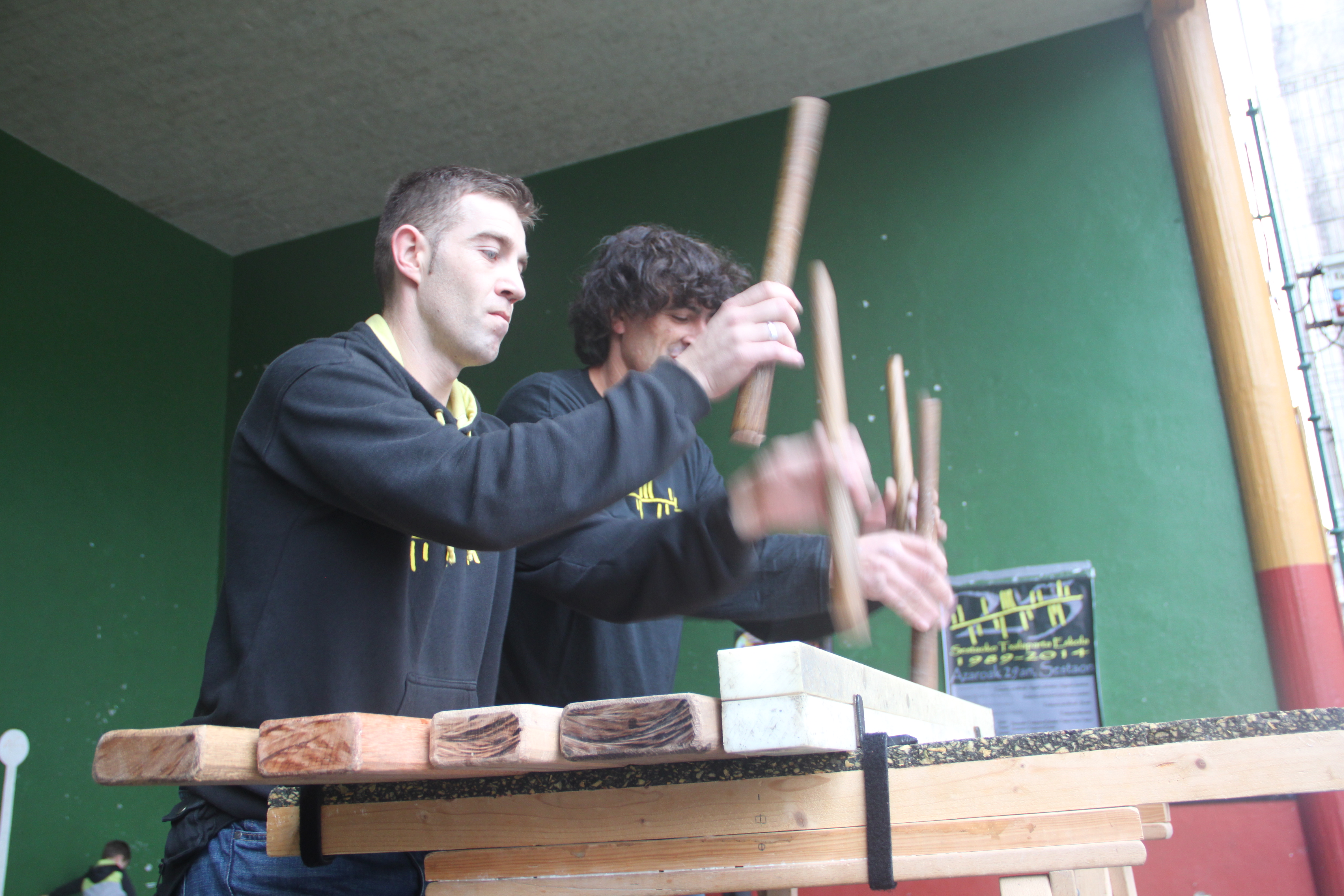 La txalaparta, se trata de una estructura rítmica, una manera de colaborar entre 2 ó más musicos/as, no tanto del propio instrumento musical.